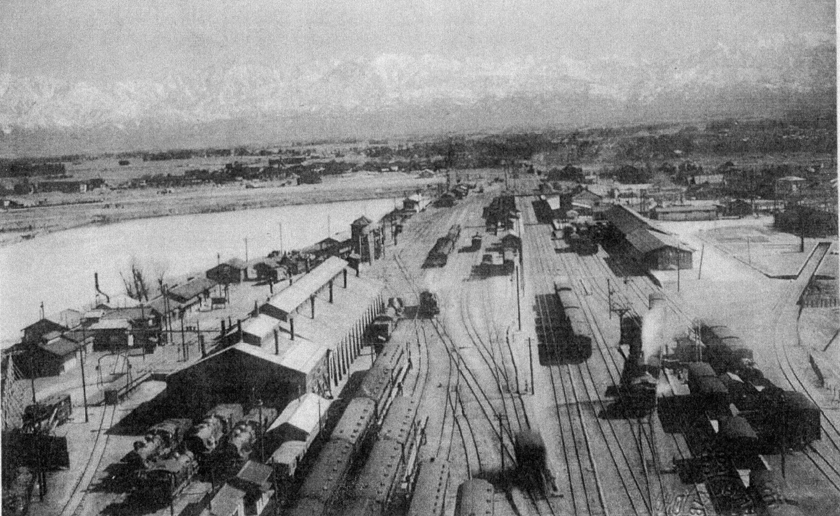 『富山県郷土の山水 呉羽山中心以東編』（村上陽一郎編、1932年（昭和7年）7月、光洋社）所収。当該写真説明文には「省線は富山駅を中心に県下石動、泊町、八四粁、富山駅から分岐する飛越線は飛越国境加賀沢まで四十ニ粁通じ、其他立山口の千垣に至る県営鉄道十九粁五を始め笹津に至る富山鉄道十七粁四、上市、五百石に至る富山電気鉄道十七粁一東岩瀬に至る富岩鉄道八粁ニ、新湊に至る越中鉄道十九粁の各社線が市を繞つて放射されて居る、従つて市を繞る駅は省線富山、西富山を始め県営の南富山、富山鉄道の富山、稲荷、山室、堀川新、富山電鉄の富山東田地方、稲荷、富岩鉄道の富山、戸山口、越中鉄道の聯隊橋、富山北口の十四駅の多きを数へ、其呑吐する旅客集散、貨物は年を逐なて増加を見つゝあり」とある。